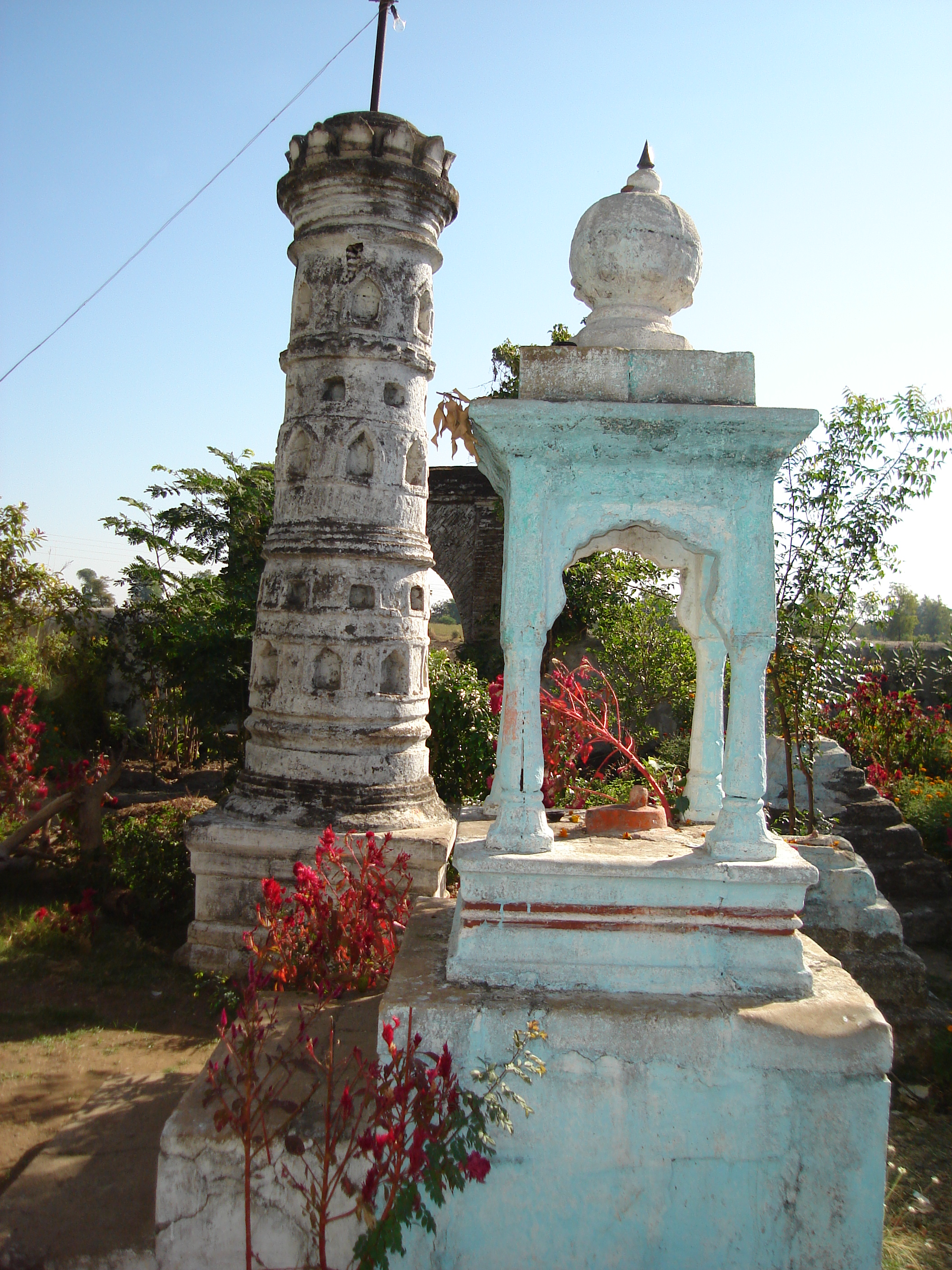 गंगामाई मंदीर परिसरातील पुजारी भक्तांची समाधी स्थळे